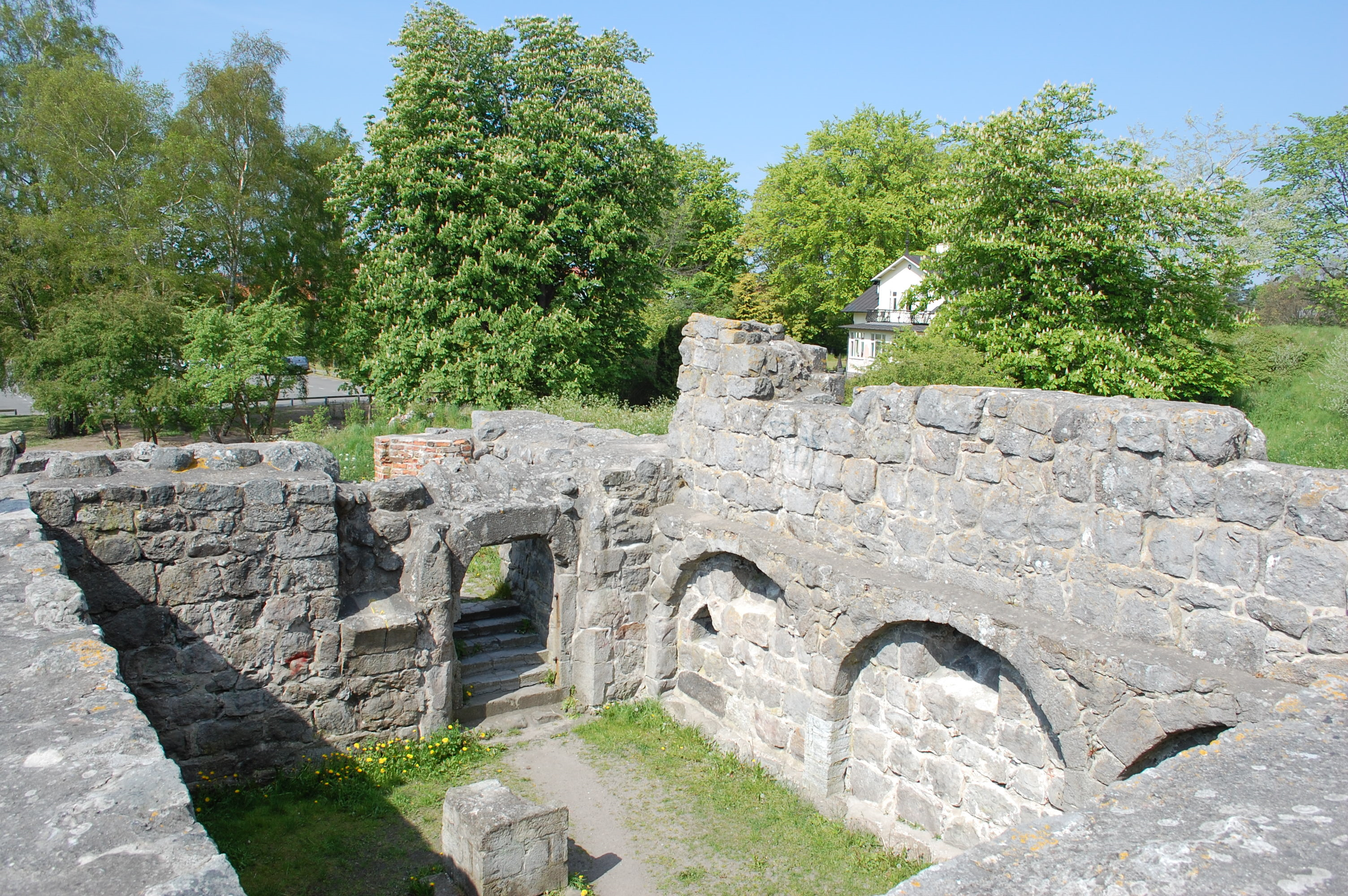 Innenraum der Schlossruine Aose hus in Åhus